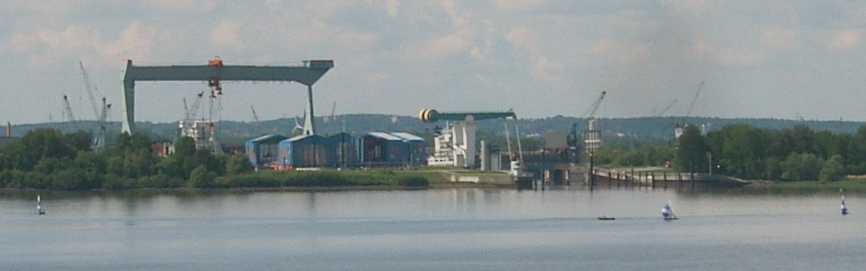 Blick über die Elbe auf die Sietas-Werft und die Este-Klappbrücke in Neuenfelde.